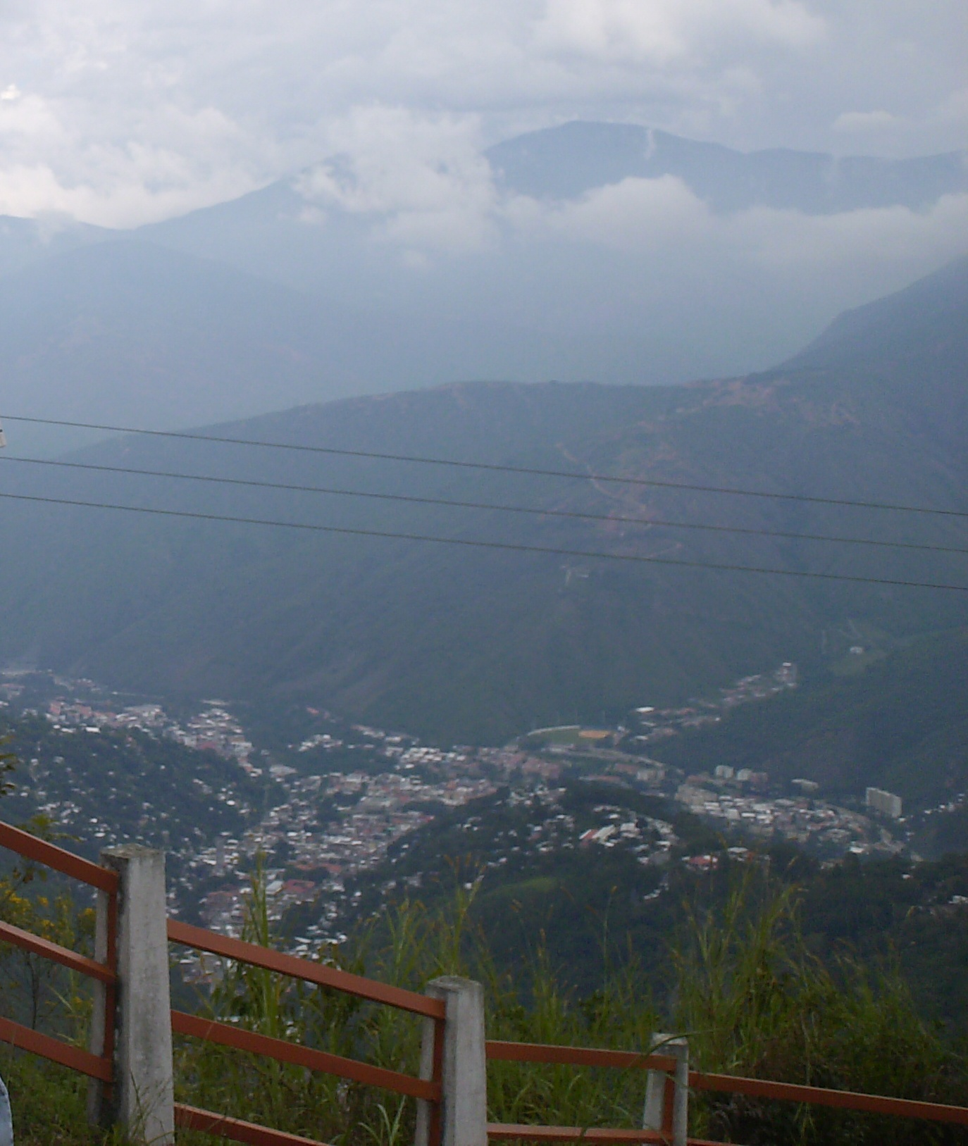 Vista desde la base del Monumento a la Virgen de la Paz sobre el cerro el Peñón, Trujillo, Venezuela.